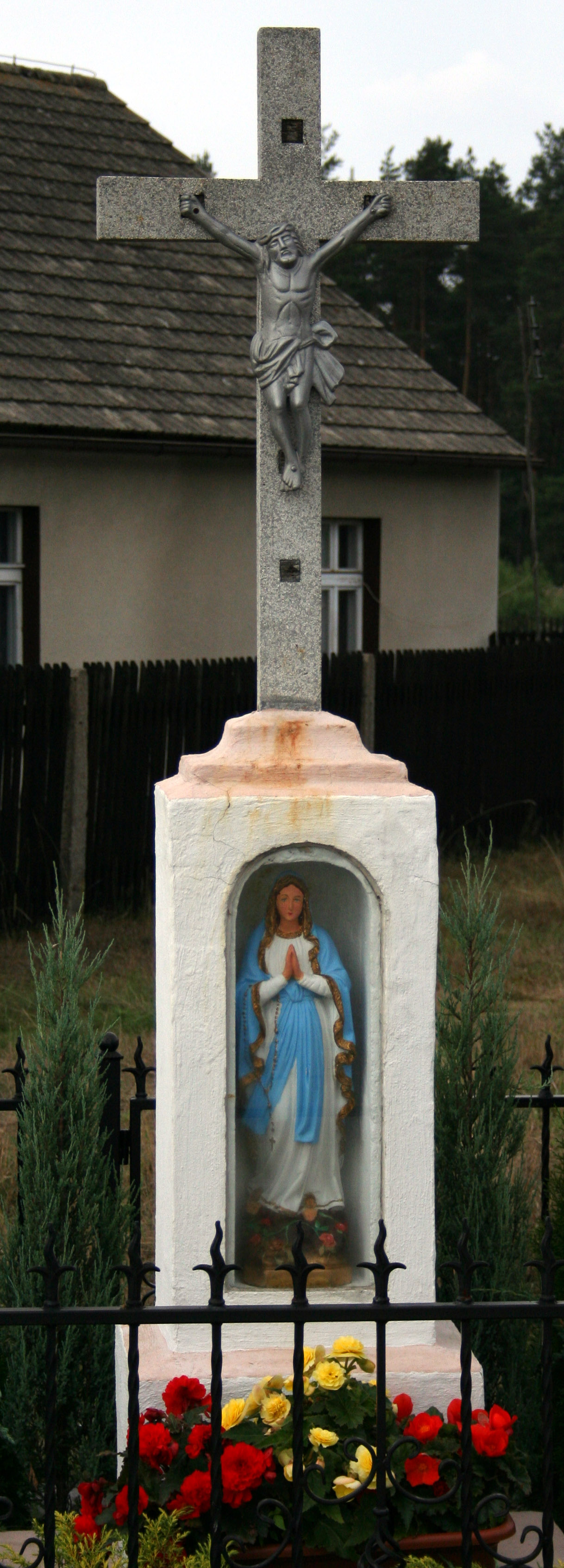 kapliczka w miejscowości Tanina, powiat lubliniecki